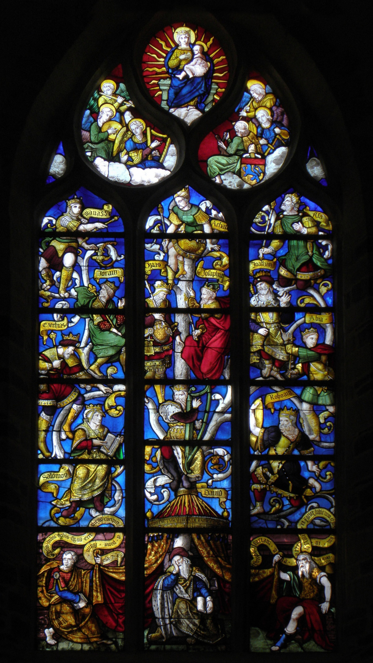 Vitrail de l'arbre de Jessé de l'église Saint-Pierre de Beignon (56).